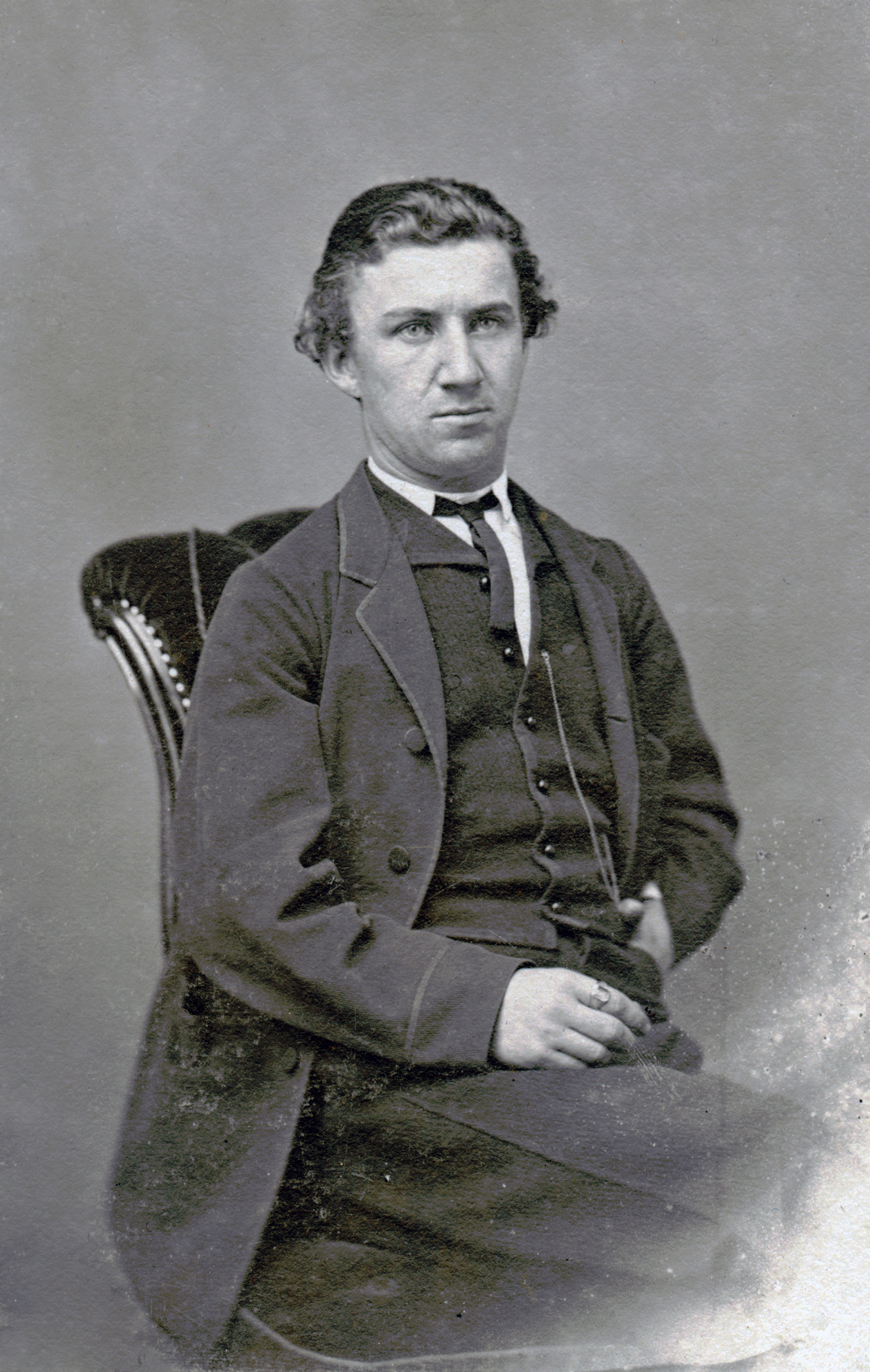 Richard Gustafsson, skådespelare. Odaterat porträtt, 1860-talet